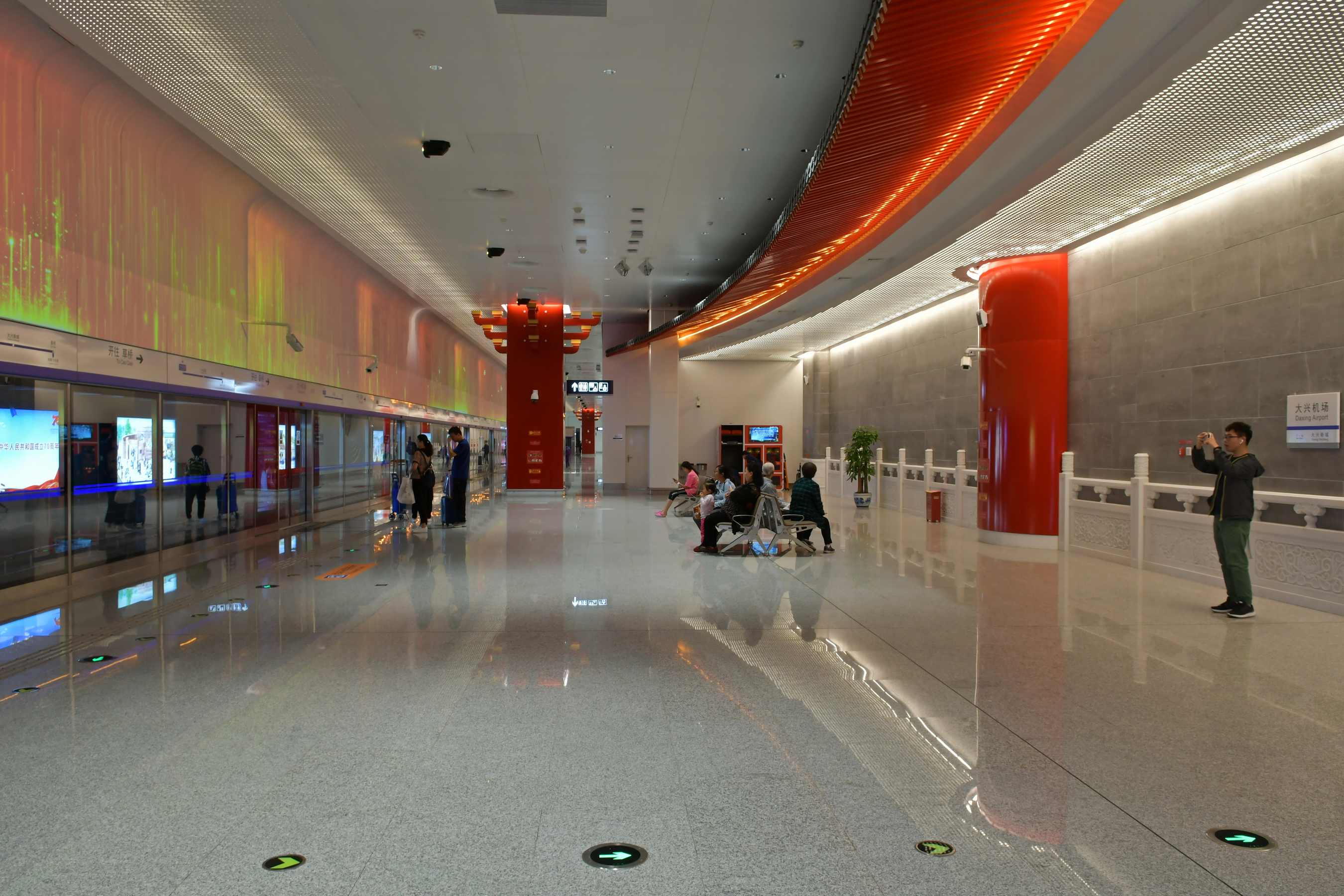 北京地铁大兴机场线大兴机场站